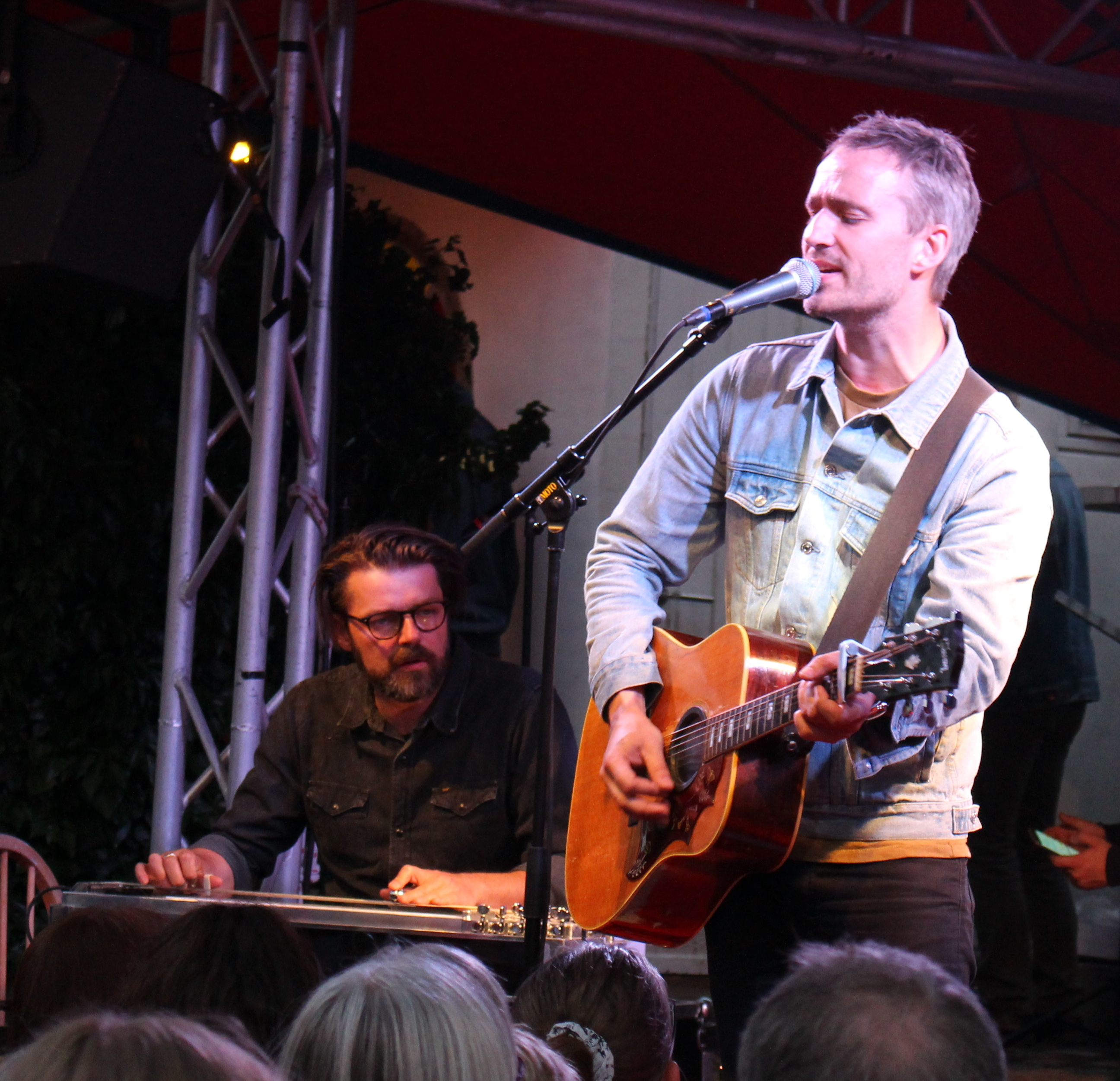 Koncert med den danske sanger Rasmus Walter under Folkemødet 2016 på Gæstgiveren